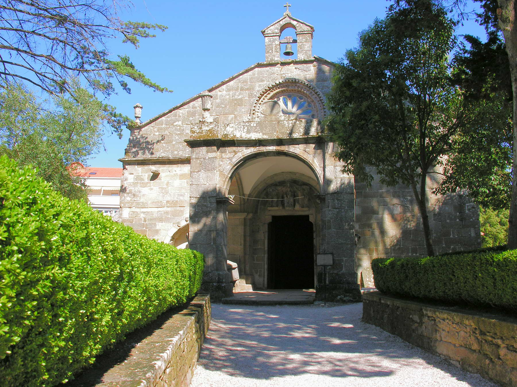 Igrexa do cemiterio, Noia, Galicia Publish by= Luis Miguel Bugallo Sánchez.